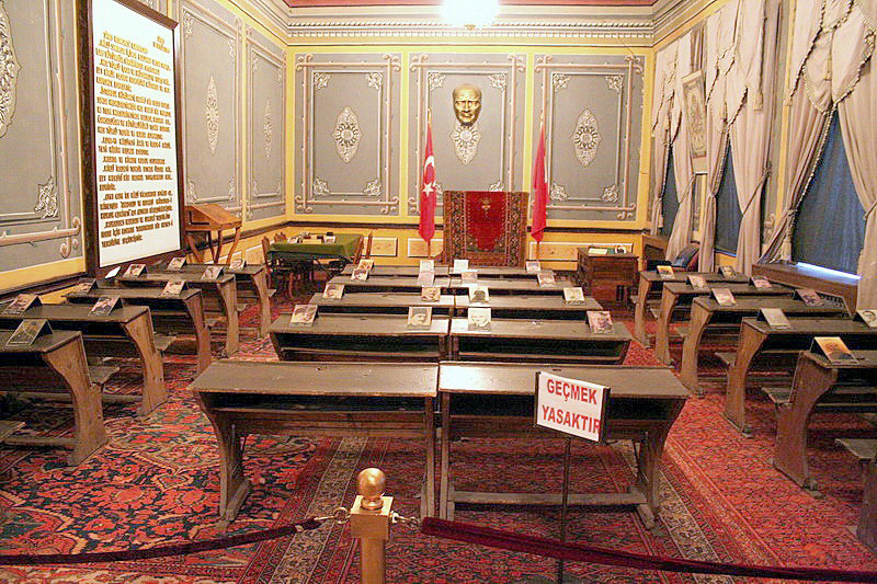 4 Eylül Sivas Kongresi'nin toplandığı Salon Atatürk Kongre ve Etnografya Müzesi, Sivas